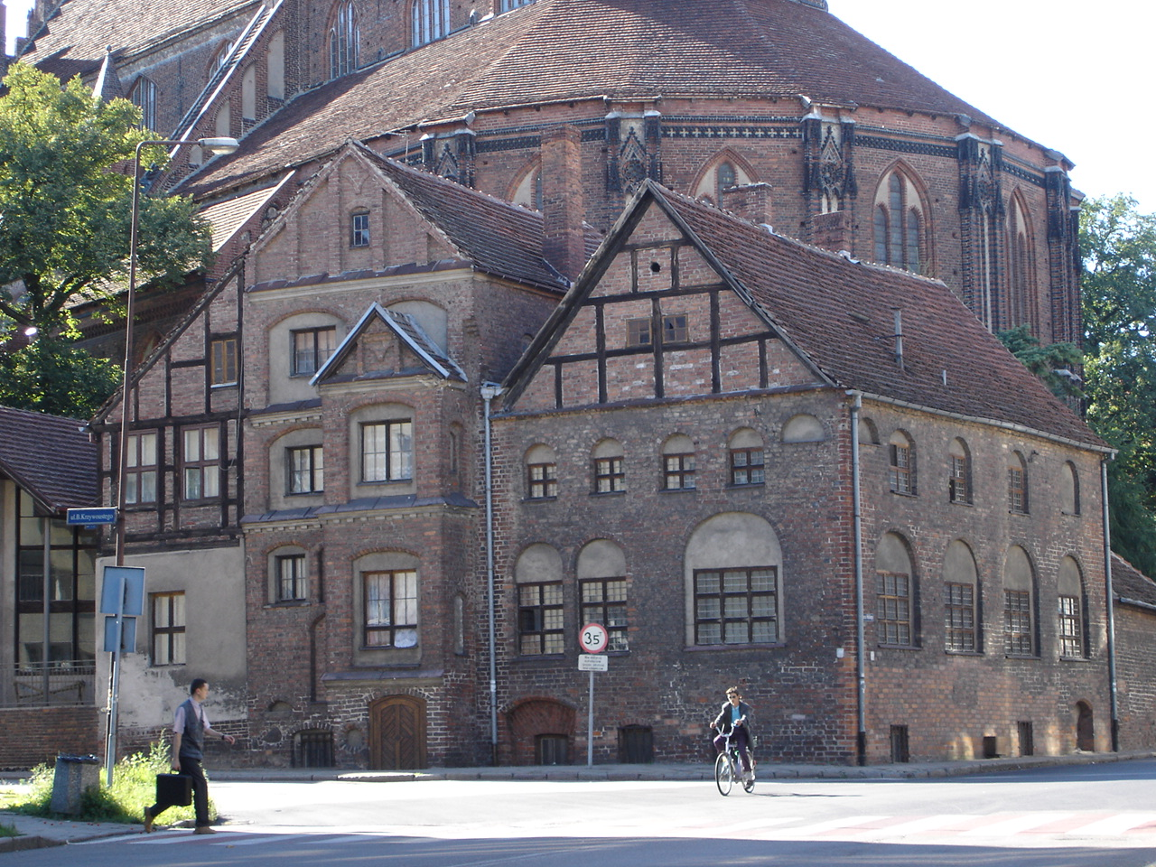 Plebania Kolegiaty NMP w Stargardzie Szczecińskim